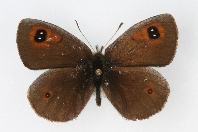 Erebia callias Sample ID: CSU-CPG-LEP001889